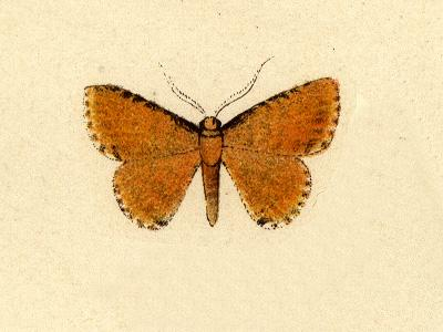 Eueana niveociliaria